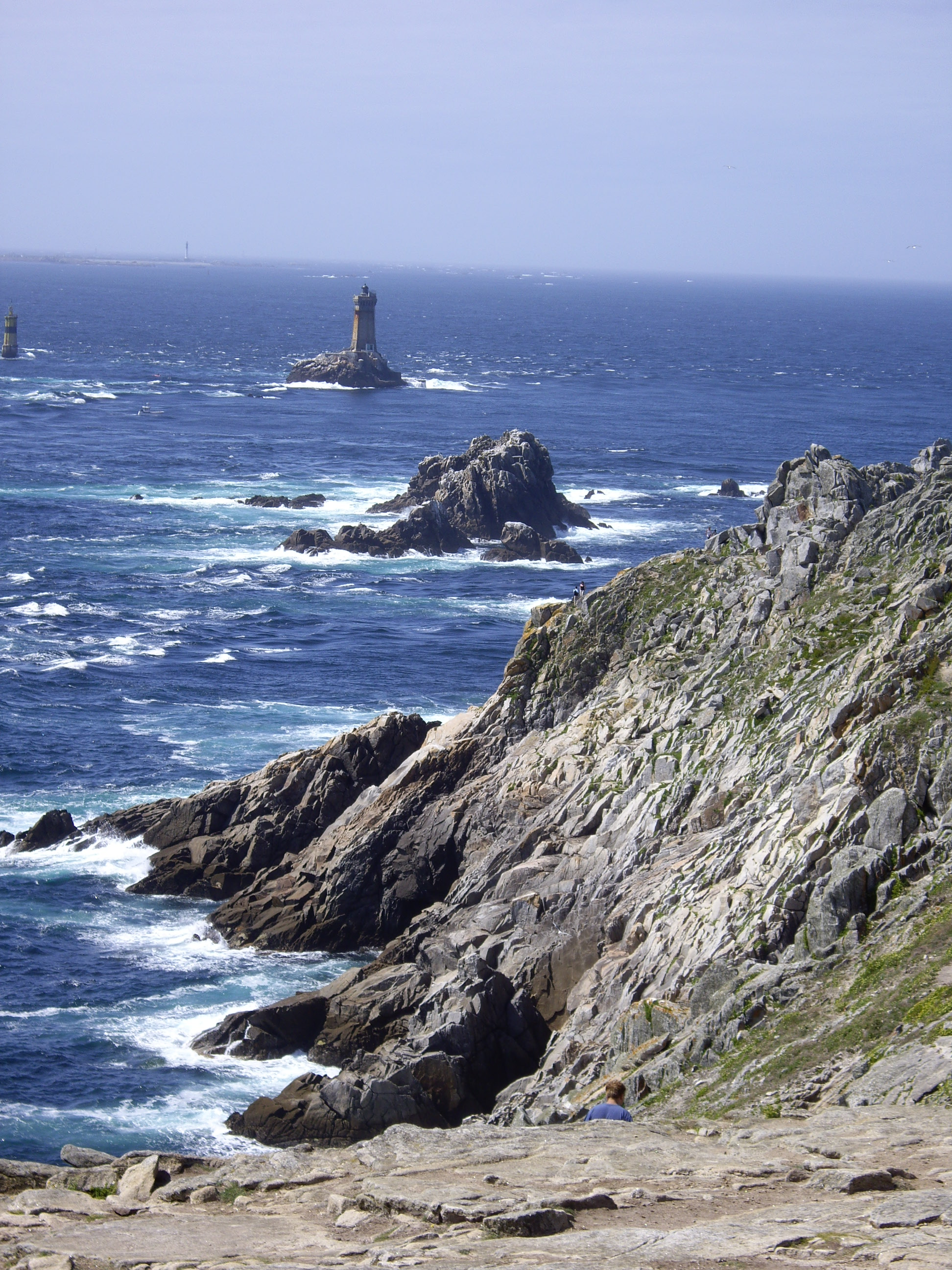 Le Grand Site de France Pointe du Raz en Cap Sizun en Bretagne, fait partie des membres du Réseau des Grands Sites de France.